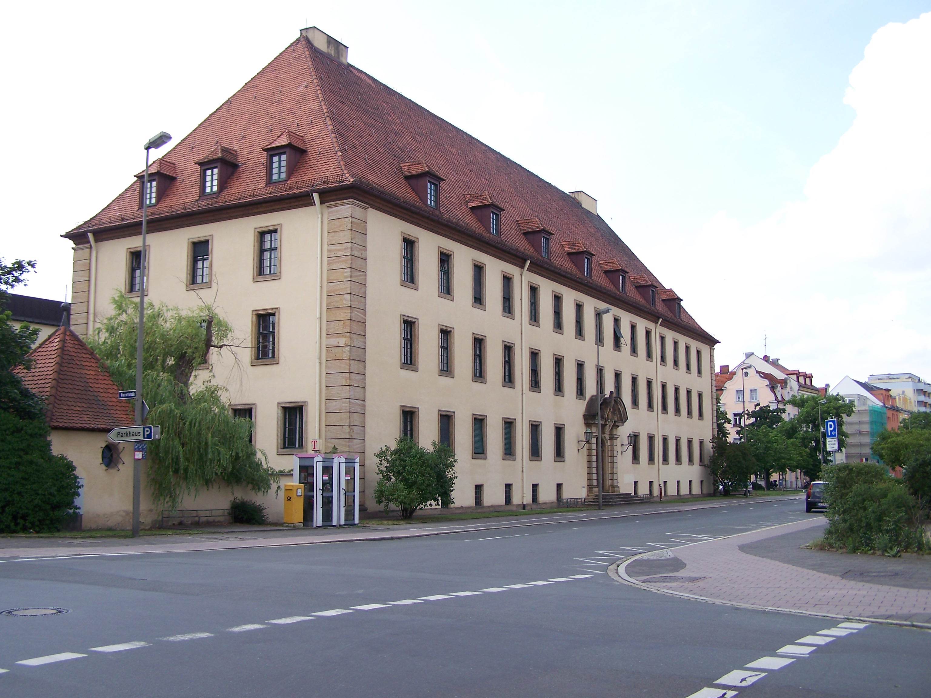 Das Bild stellt den Altbau des Amtsgerichts Erlangen dar. siehe Beschreibung